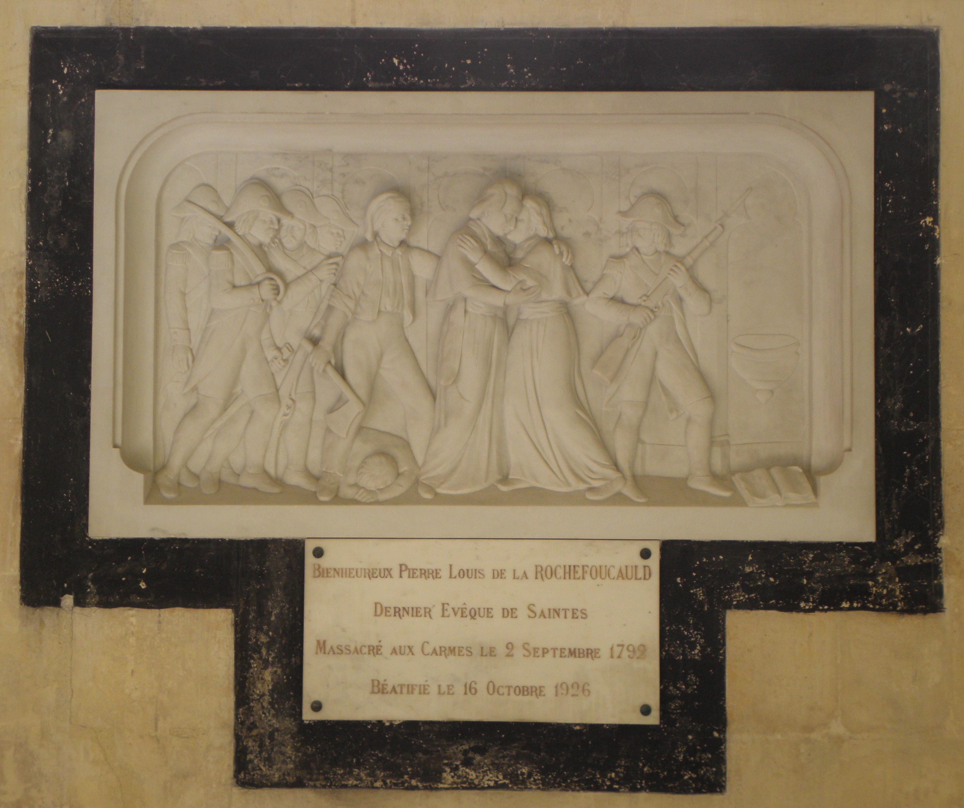 Intérieur de la cathédrale Saint-Pierre de Saintes (17). Chapelle La Rochefoucauld-Bayers. Plaque de marbre figurant les bienheureux François-Joseph et Pierre-Louis de La Rochefoucauld-Bayers, évêques de Beauvais et Saintes, martyrs des Carmes.